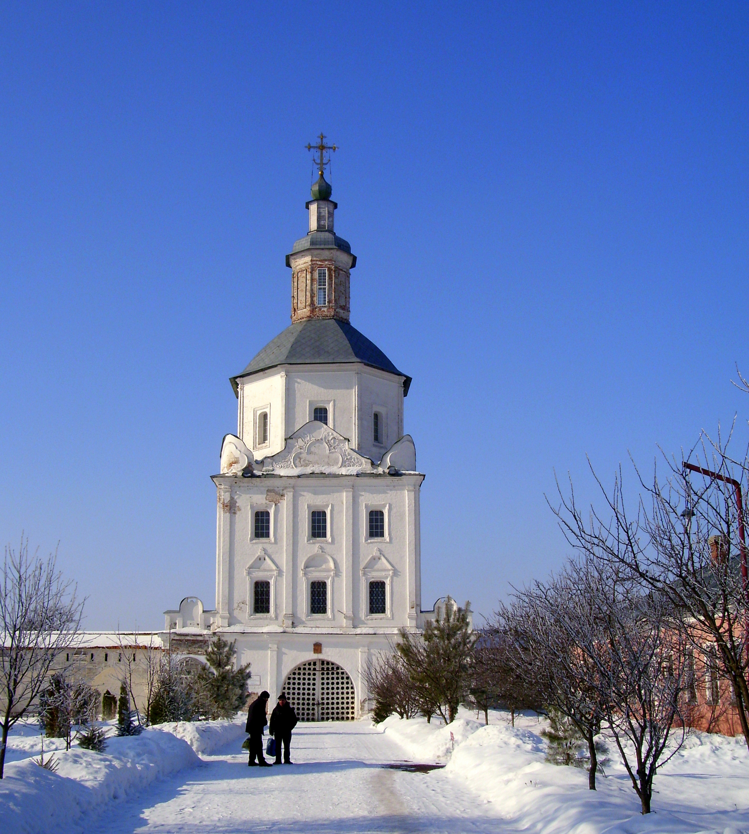 Церковь Спаса Преображения (Брянская область, Брянск, посёлок Супонево)